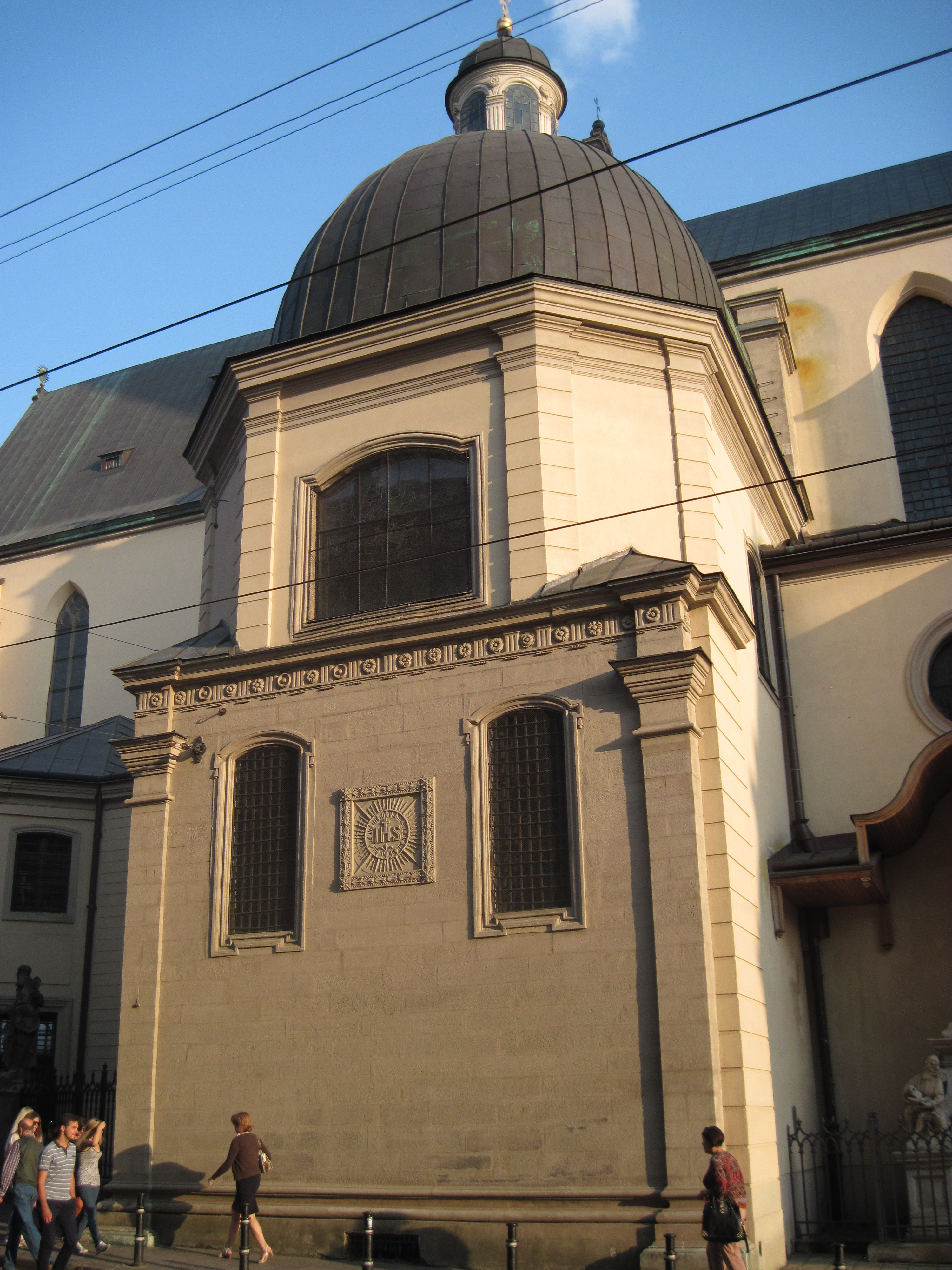 Каплиця Святих Дарів (Вишневецьких, на місці каплиці Бучацьких), катедра Львів